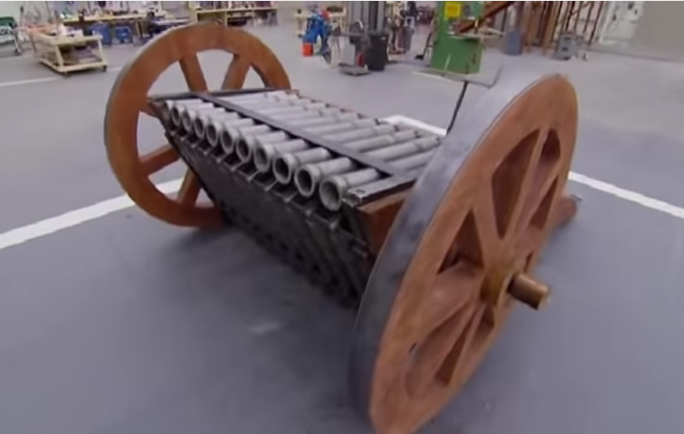 Это изображение пулемета Леонардо да Винчи, который воссоздали инженеры с Discovery Channel